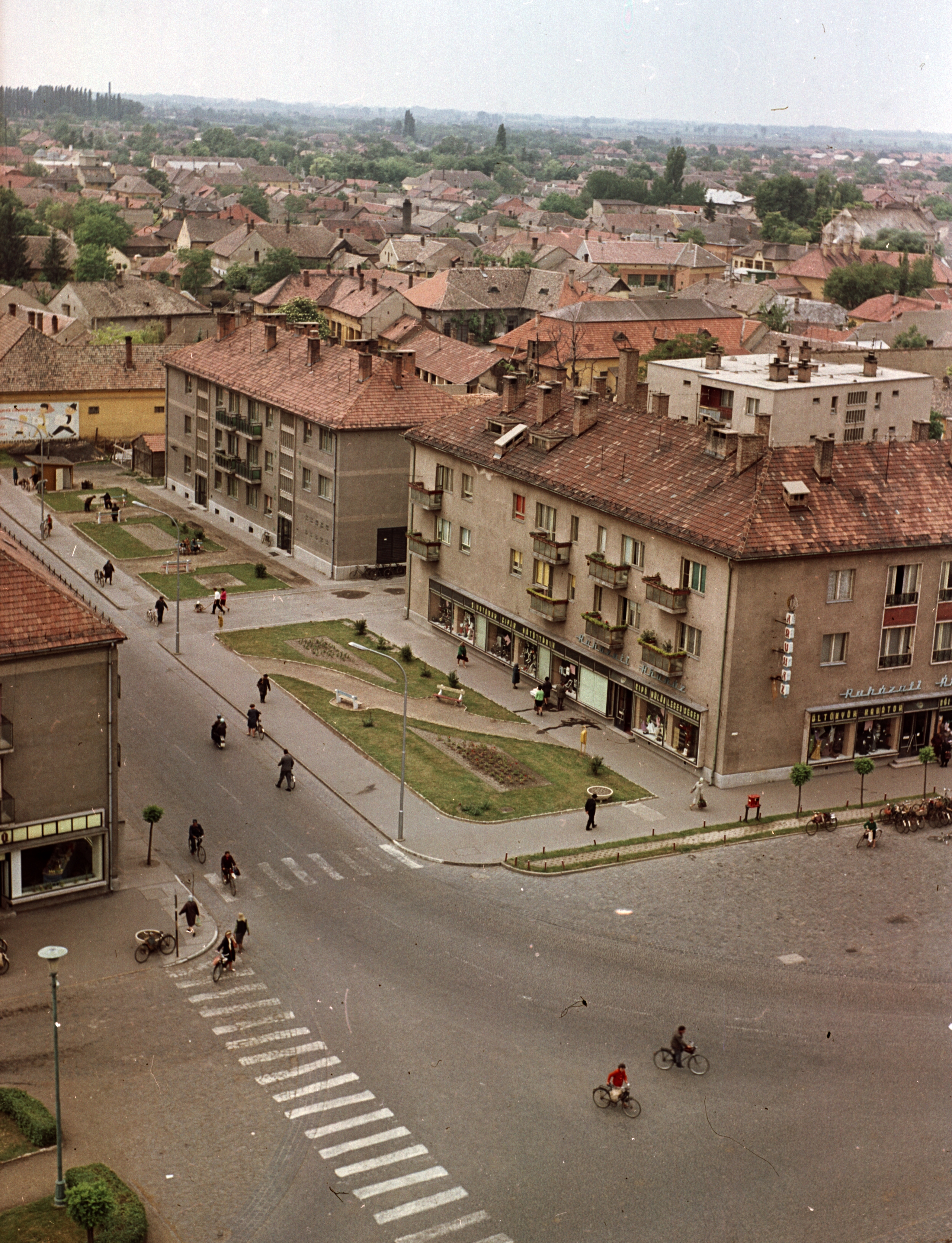 a Kecskeméti út torkolata a Szabadság térnél a református templom tornyából fényképezve. Location: Hungary Tags: colorful Title: a Kecskeméti út torkolata a Szabadság térnél a református templom tornyából fényképezve.